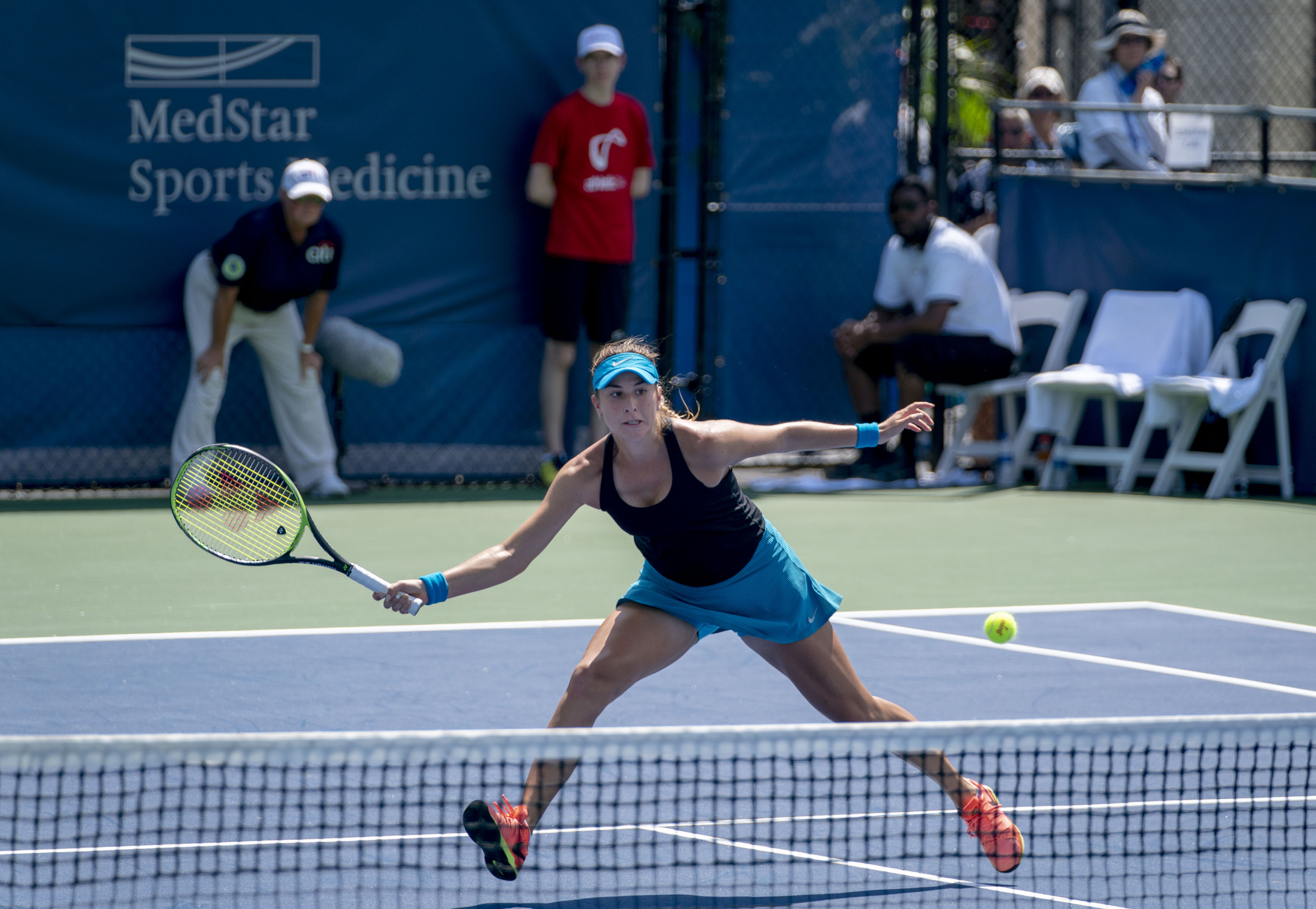 2018 Citi Open Tennis